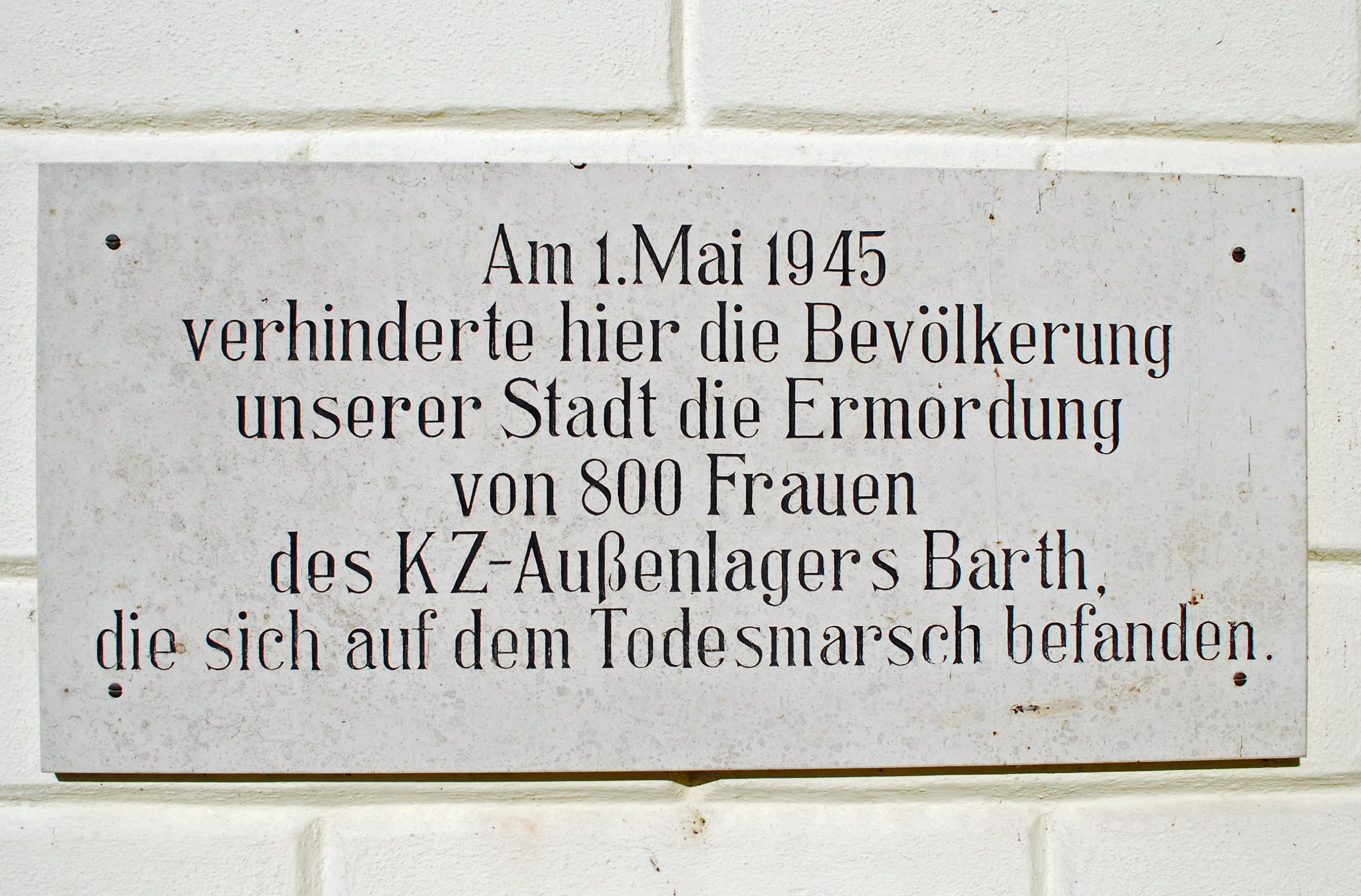 Gebäude und Denkmal in Ribnitz-Damgarten